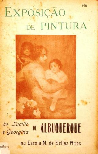 Capa do catálogo da exposição de Lucílio de Albuquerque realizado na Escola Nacional de Belas Artes em 1911.